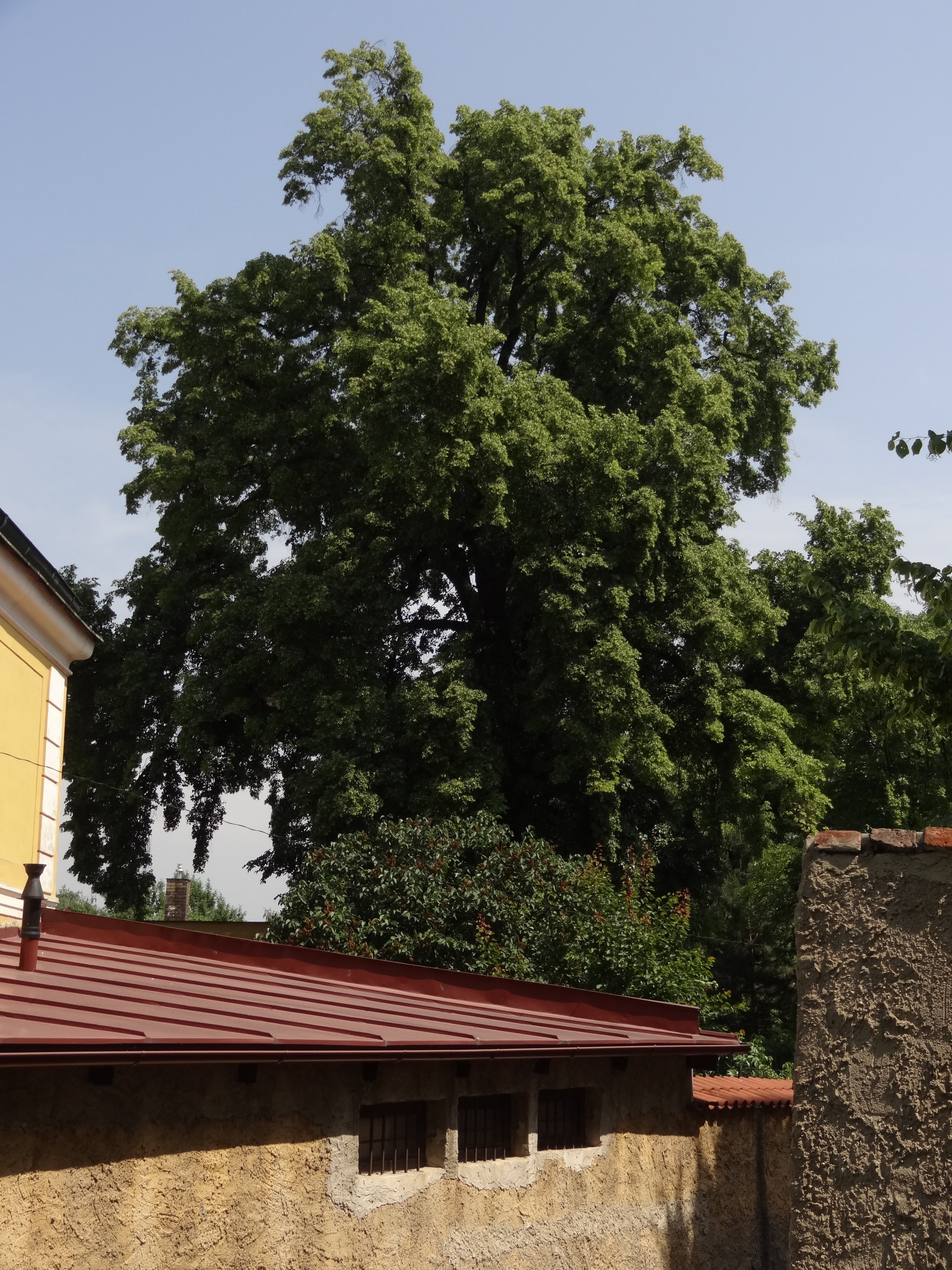 Vinoř - památná lípa srdčitá v zahradě u čp. 16